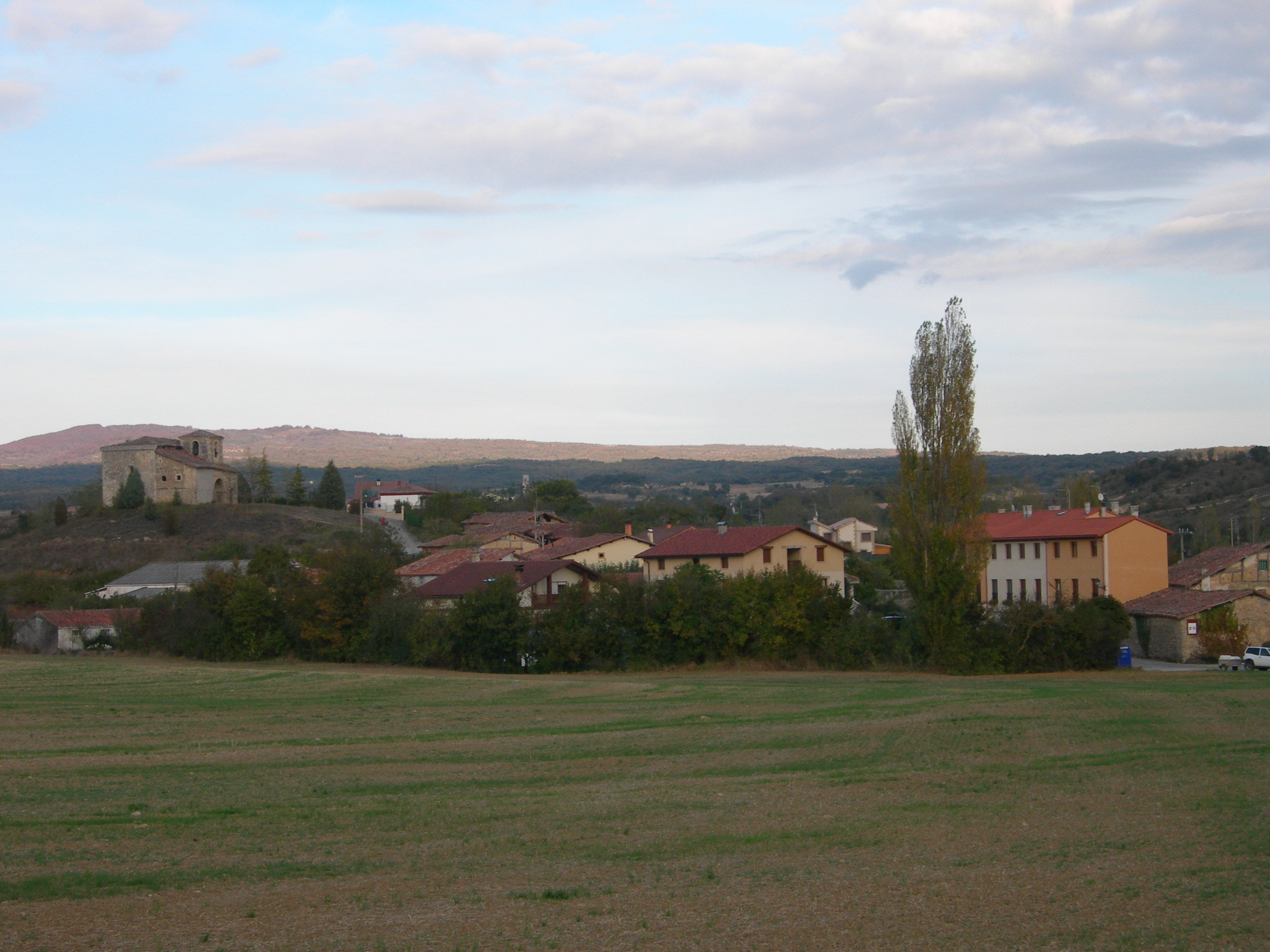 Vista de Saraso, Treviño, desde el Alto Suarra